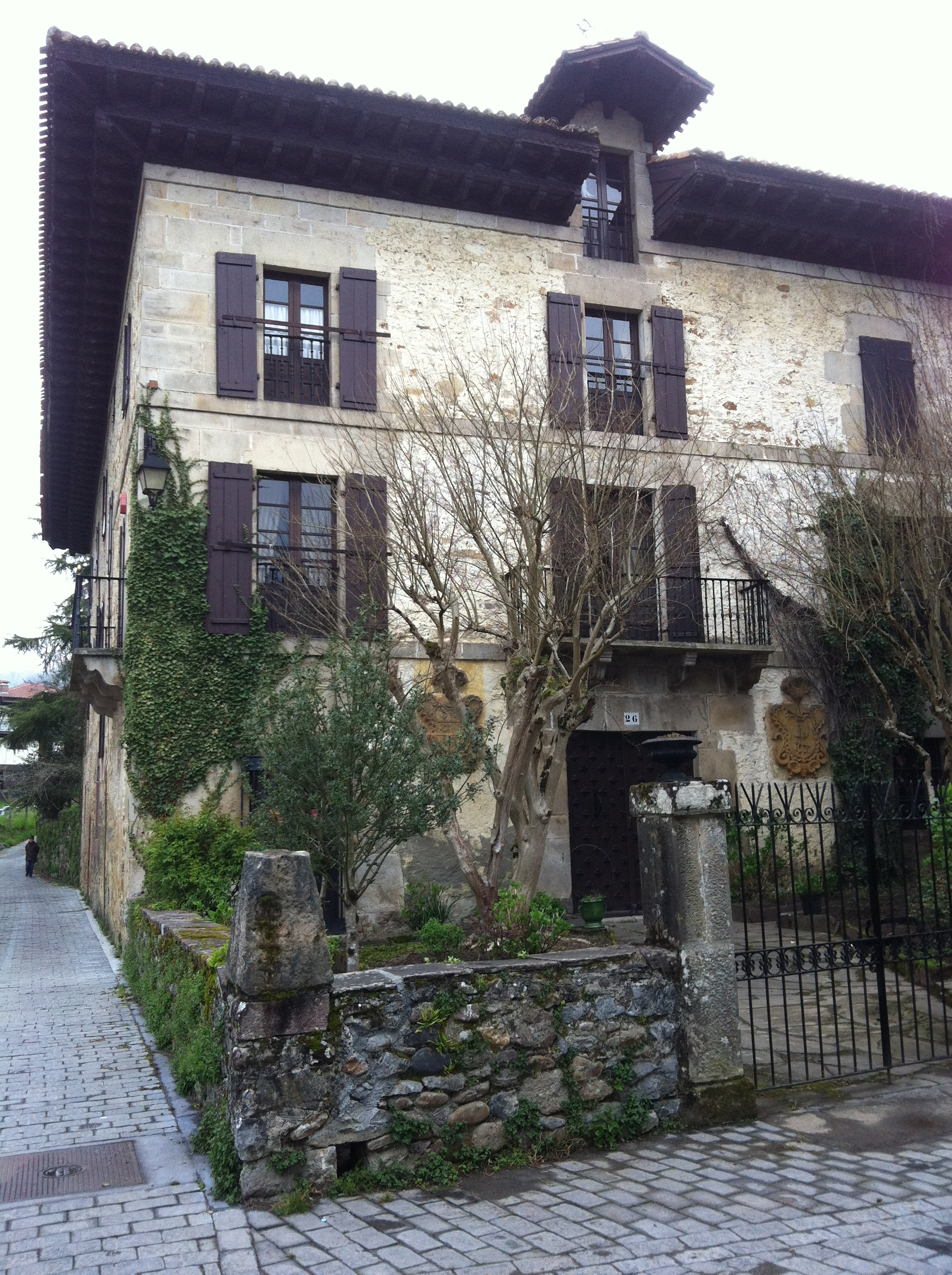 Itzea, casa de los Baroja en Bera de Bidasoa (Navarra)